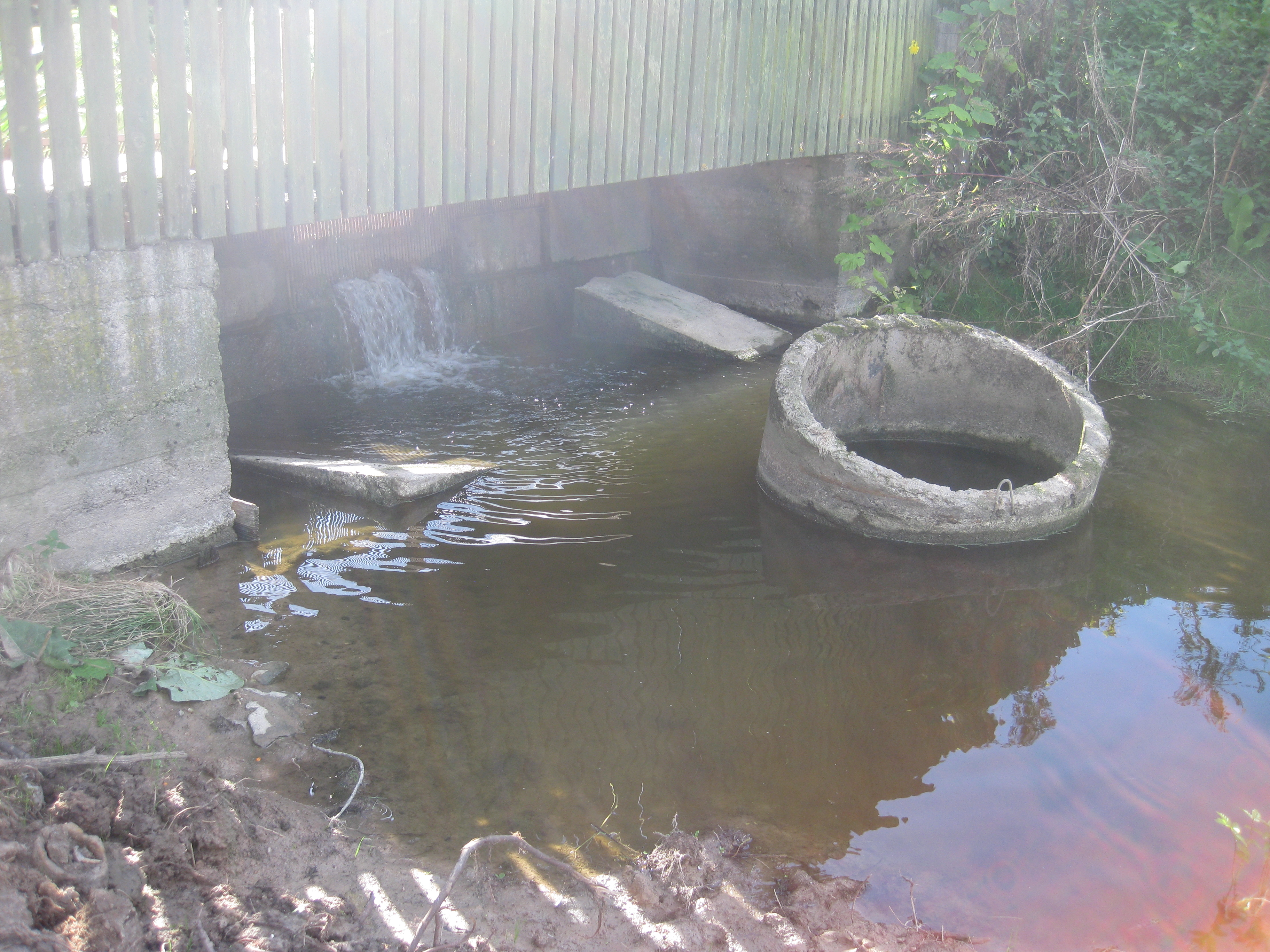 Jonučiai, Lithuania